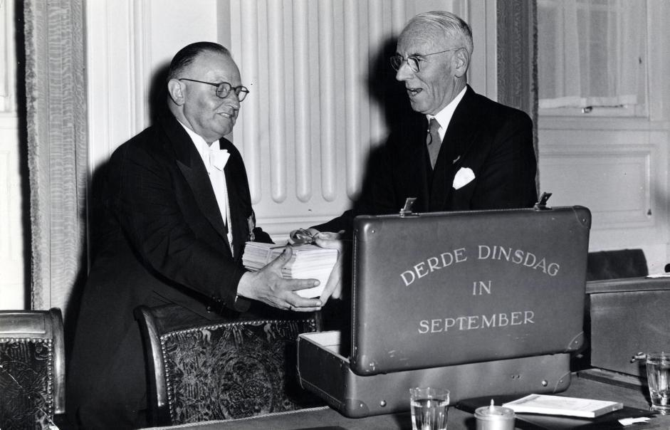 Kieft, J. van de (SDAP / PvdA). Prinsjesdag 1955, opening van de Staten-Generaal. Minister van de Kieft haalt de miljoenen-nota uit het koffertje. Nederland, Den Haag, 20 september 1955.